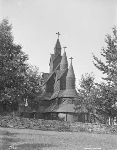 Heddal stavkyrkje (Heddal stave church, Notodden kommune, Telemark fylke, Norway.)